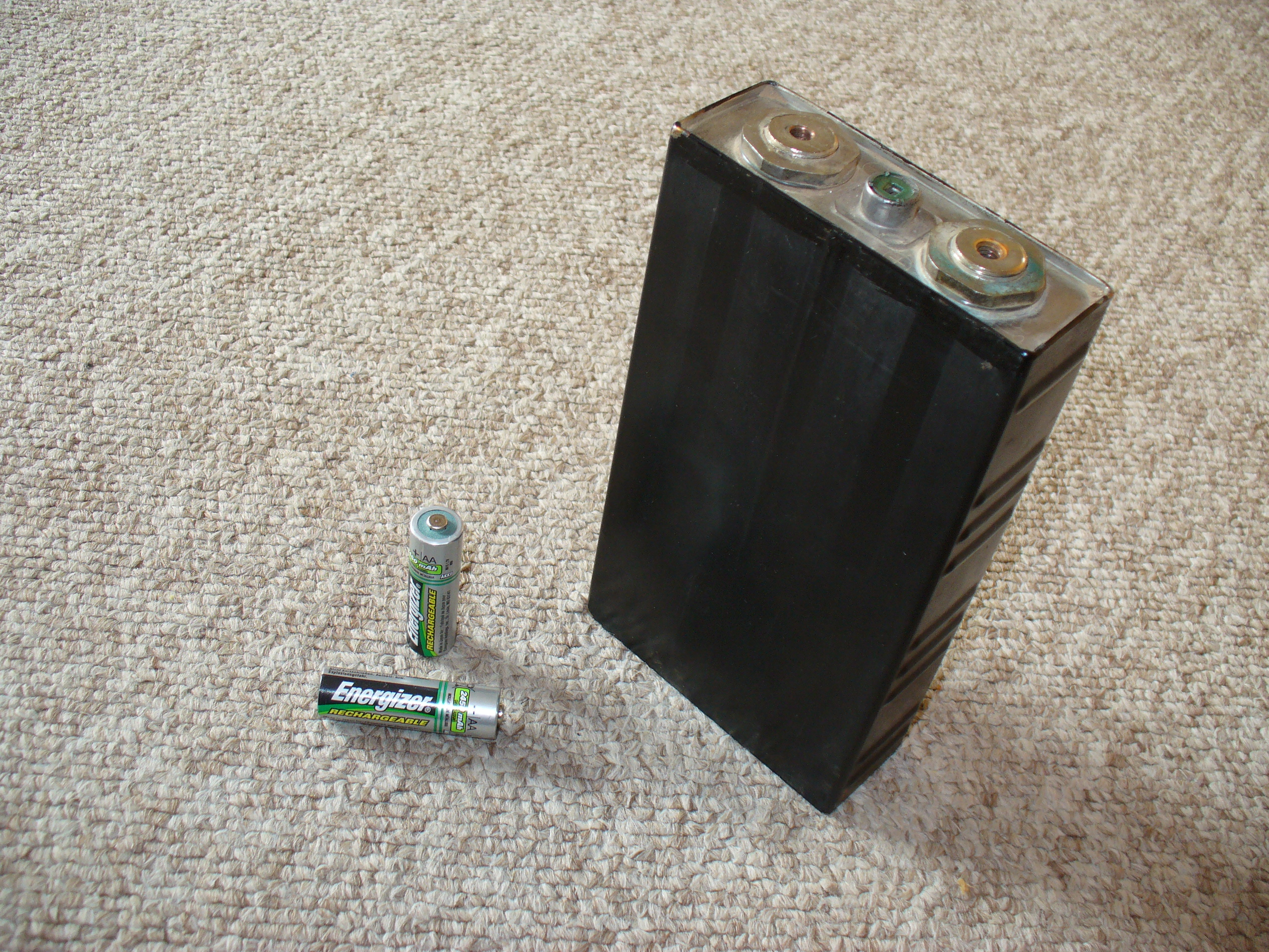 NiMH-Zelle 1,2V 80Ah aus einer Traktionsbatterie, zum Größenvergleich zwei AA-Mignonzellen "Energizer"